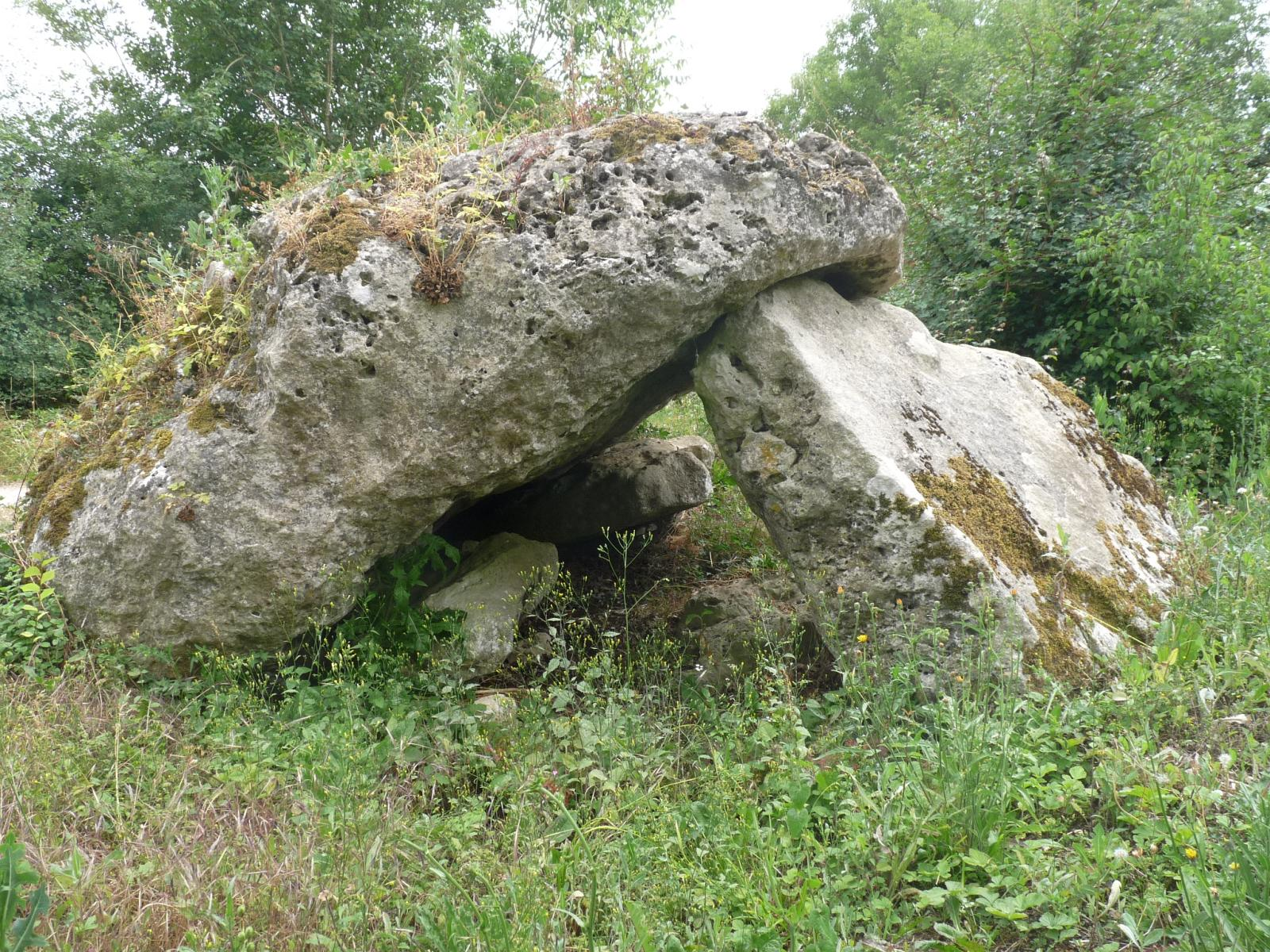 Dolmen de Magné, Courcôme, Charente, France